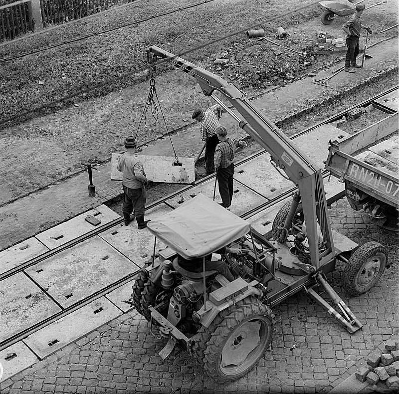 Original image description from the Deutsche FotothekStraßenbahngleisbau in der Warthaer Straße. Verlegen von Straßen- und Gleisschlußplatten mit Mobildrehkran